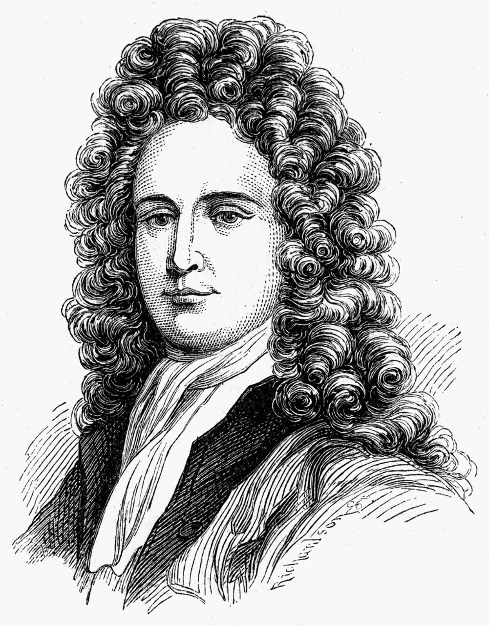 מתוך ספרו של Thurston מ-1878 על התפתחות מנוע הקיטור.